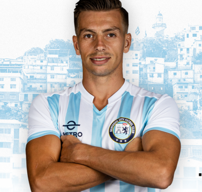 jugador profesional argentino